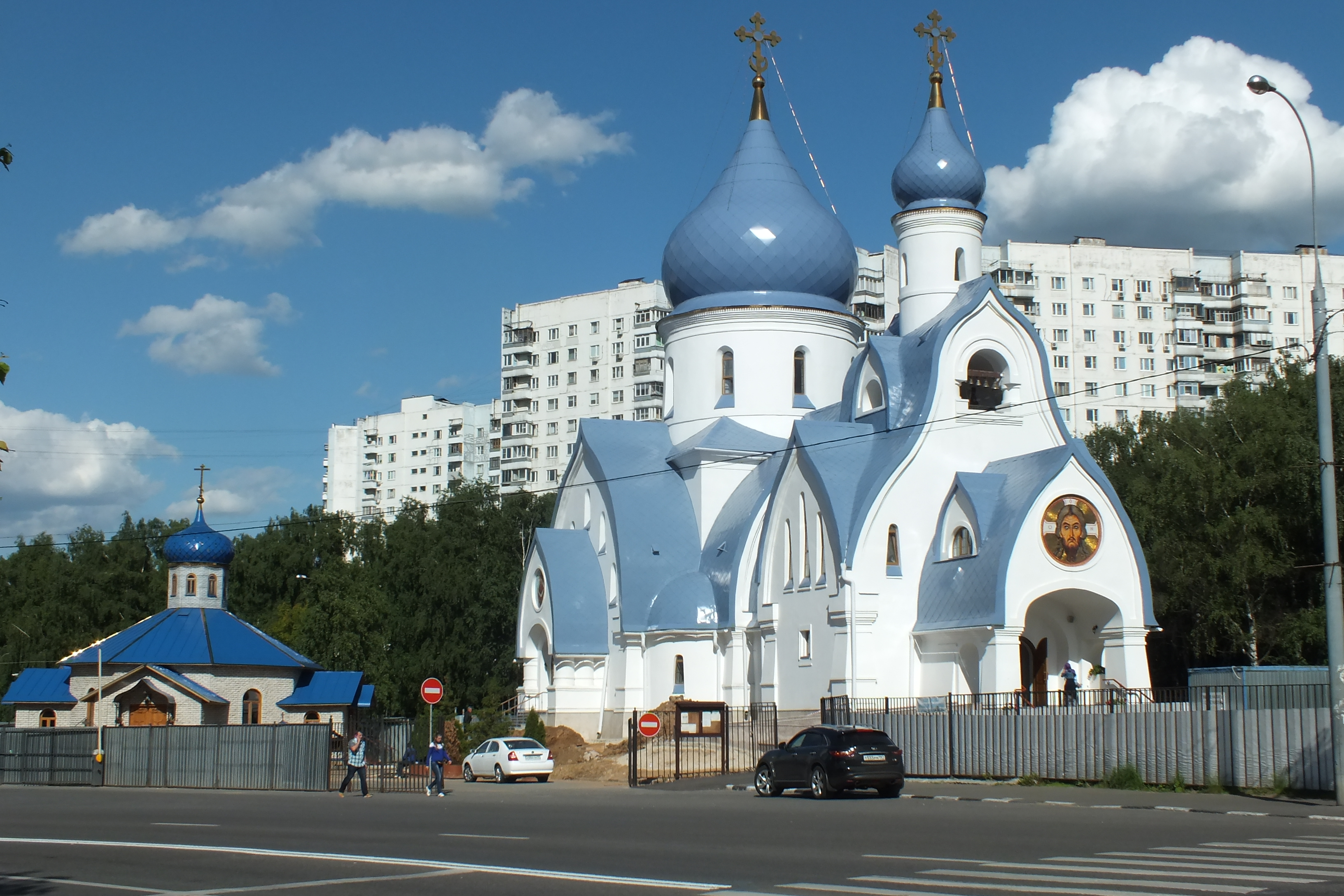 Храм, построенный в 2015 (возможно, в 2014) году на Ясеневой улице в Москве.